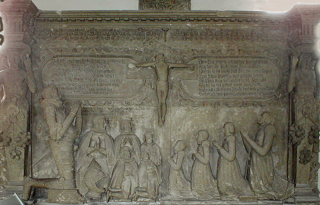 Grabmal des Johann Heinrich von Ehrenberg († 1584) in der Bergkirche zu Heinsheim. Das Grabmal zeigt den Verstorbenen mit seiner Frau und acht Kindern vor dem Heiland knieend.